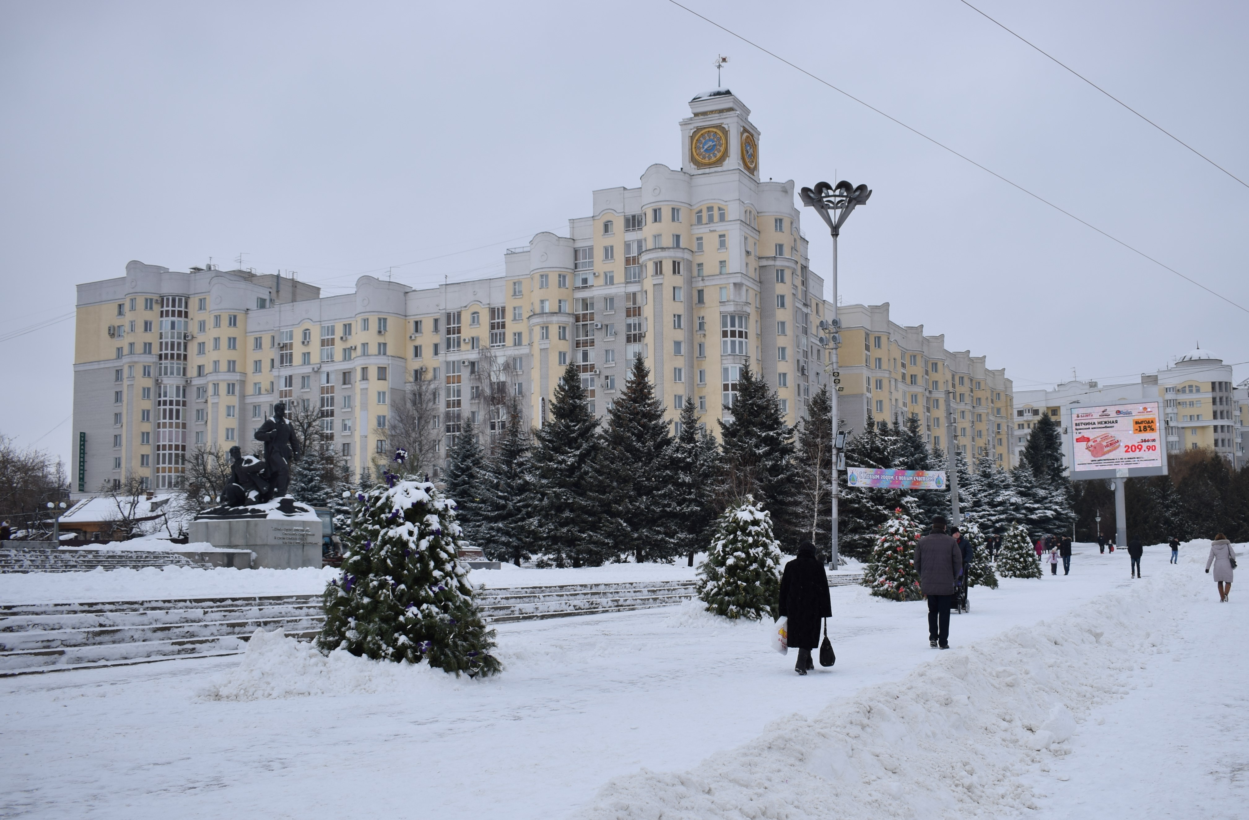 Дом с часами на площади Партизан в новогодние каникулы (январь 2017 года)